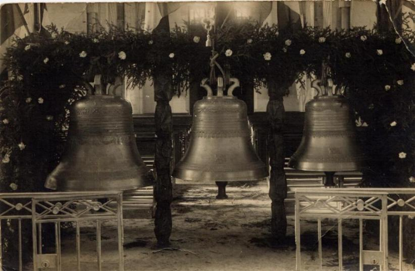 Les cloches à Saint-Loup-en-Champagne en 1921.